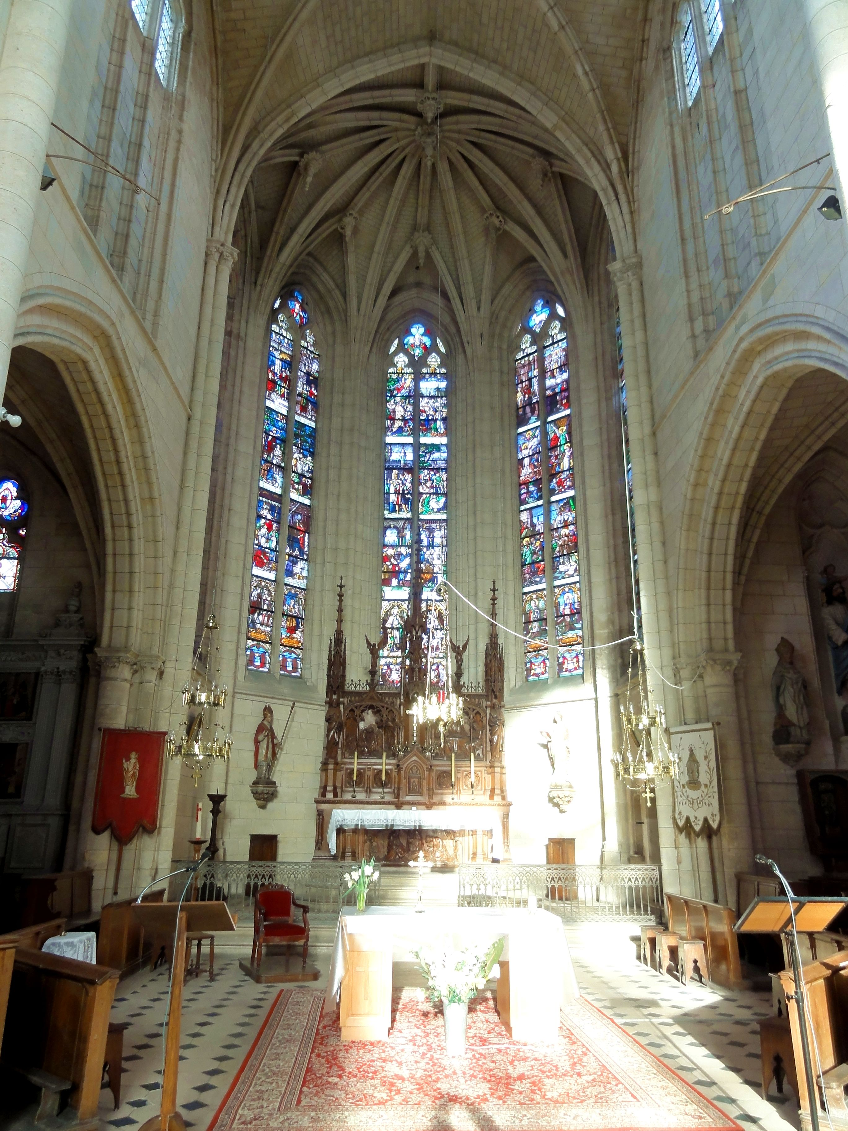 Chœur.